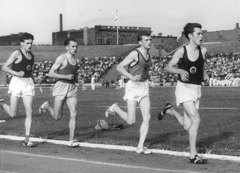 Gerhard Mitzschke, Jahnke, Klaus Porbadnik, Hönicke Zentralbild Wendorf 12.7.1957 Deutsche Athletik-Meisterschaften 1957 Vom 12. bis 14.7.1957 finden im Berliner Walter-Ulbricht-Stadion die Deutschen Leichtathletik-Meisterschaften 1957 statt. UBz: 10 000-m-Lauf der Männer. Wir erkennen von links nach rechts: Mitzschke (SC Wismut Karl-Marx-Stadt, 2. Platz), Jahnke (ASK Vorwärts, Sieger) und Hönicke (SC Wismut Karl-Marx-Stadt, 3. Platz).